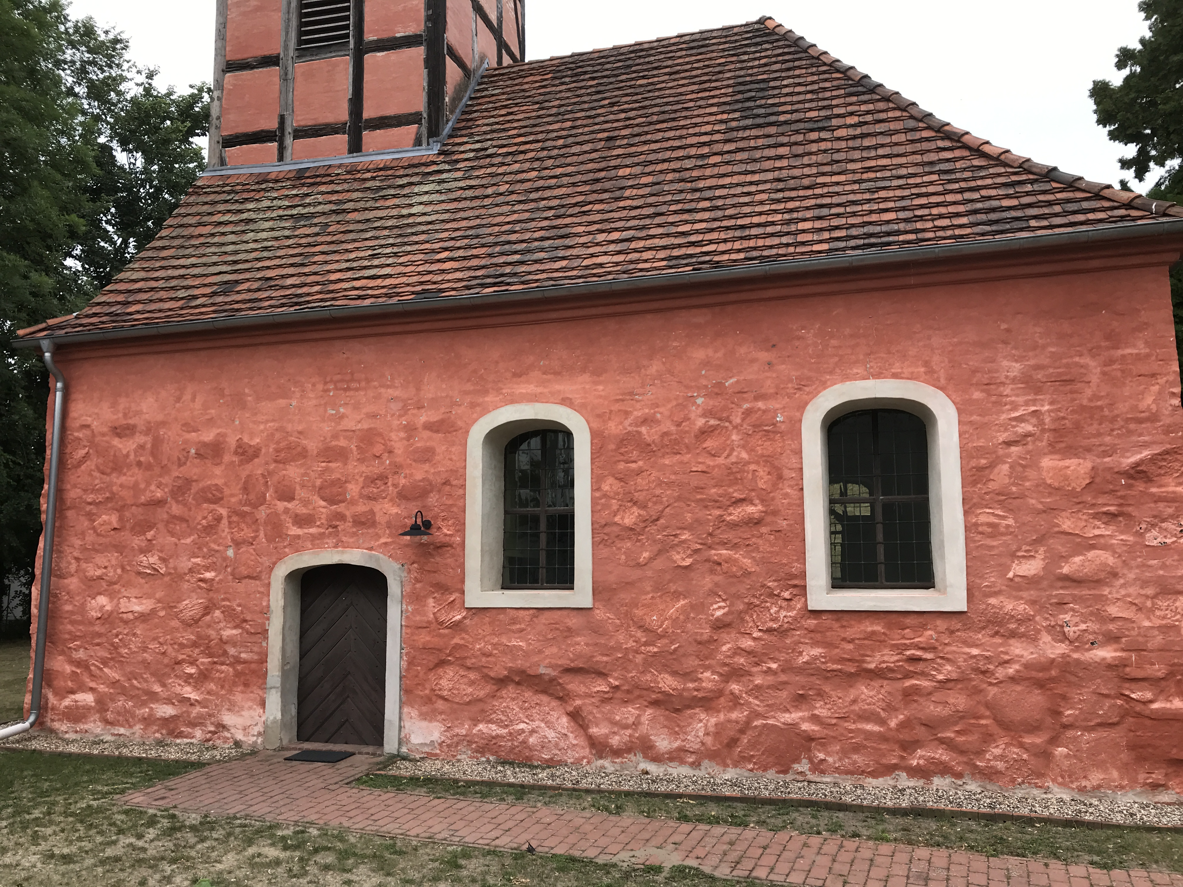 Die Dorfkirche in Kemnitz ist eine spätgotische Feldsteinkirche, die nach einem Brand in den Jahren 1755 bis 1756 erneuert wurde. Im Innern steht unter anderem ein Kanzelaltar aus dieser Zeit.